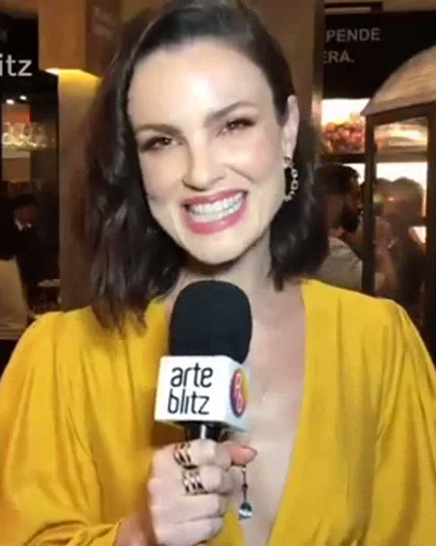 Carolina Kasting fala sobre sua personagem na telenovela Salve-se Quem Puder.